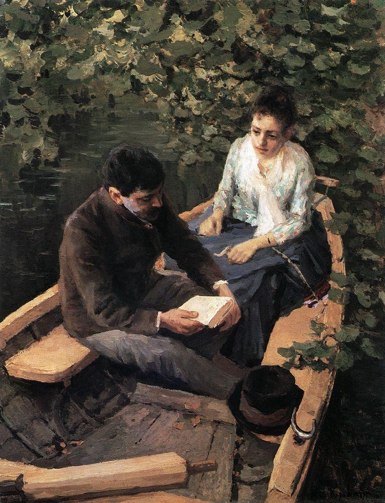 В лодке (1888)